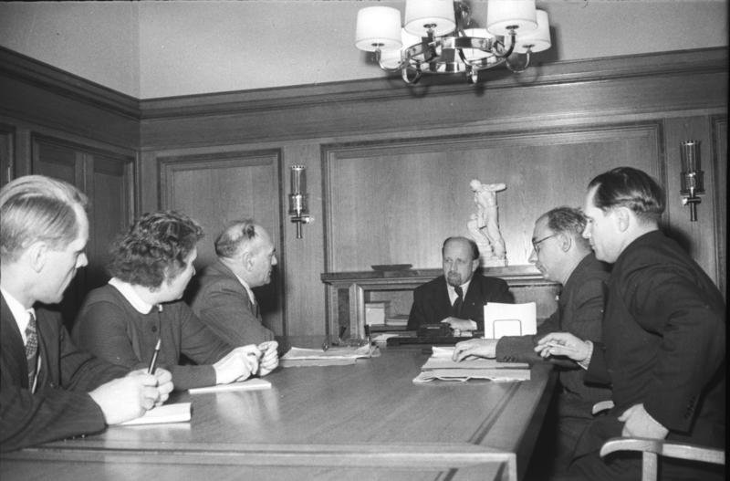 Illus/Heilig 30.11.1950 Aus dem Leben unseres Stellvertretenden Ministerpräsidenten Walter Ulbricht. U.B.z: In seiner Eigenschaft als General-Sekretär der SED führt Walter Ulbricht täglich Konferenzen und Besprechungen mit leitenden Partei- und Staatsfunktionären durch. Staatssekretär Hans Warnke informiert den Stellvertretenden Ministerpräsidenten über einen interessanten Vorgang in seinem Arbeitsbereich.